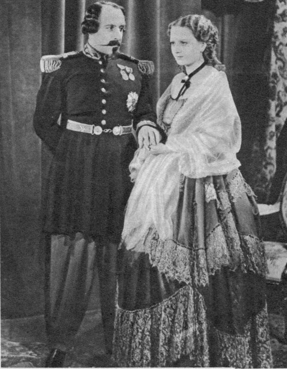 Enzo Biliotti e Pina Cei in una foto di scena di Villafranca, regia di Giovacchino Forzano (1934). Dalla rivista Novella, settimanale di novelle e varietà, XVI, 3, 21 gennaio 1934.